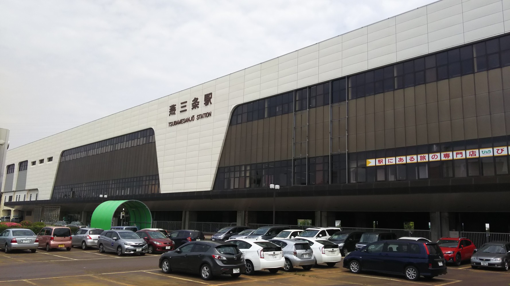 燕三条駅駅舎